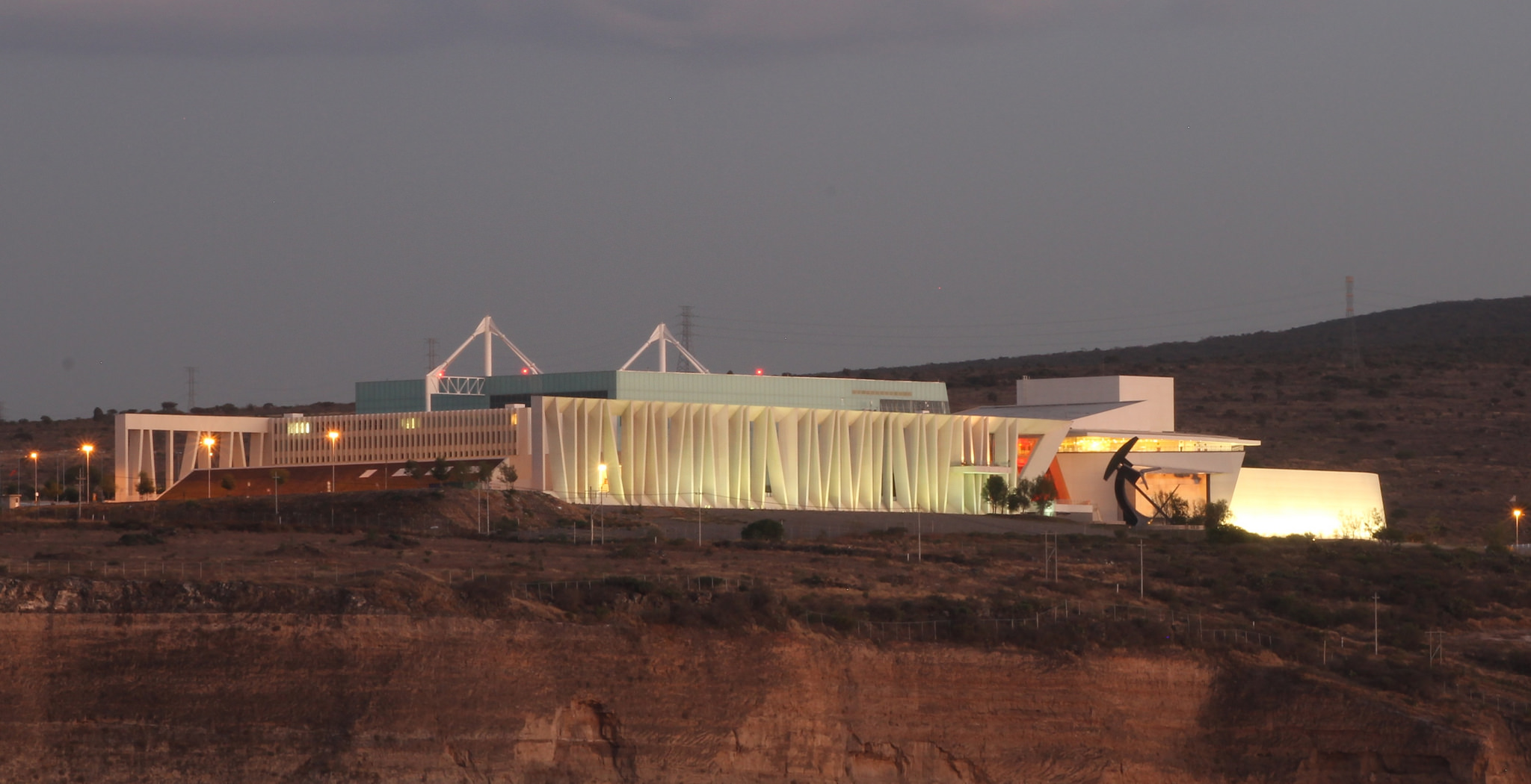 Santiago de Querétaro Centro